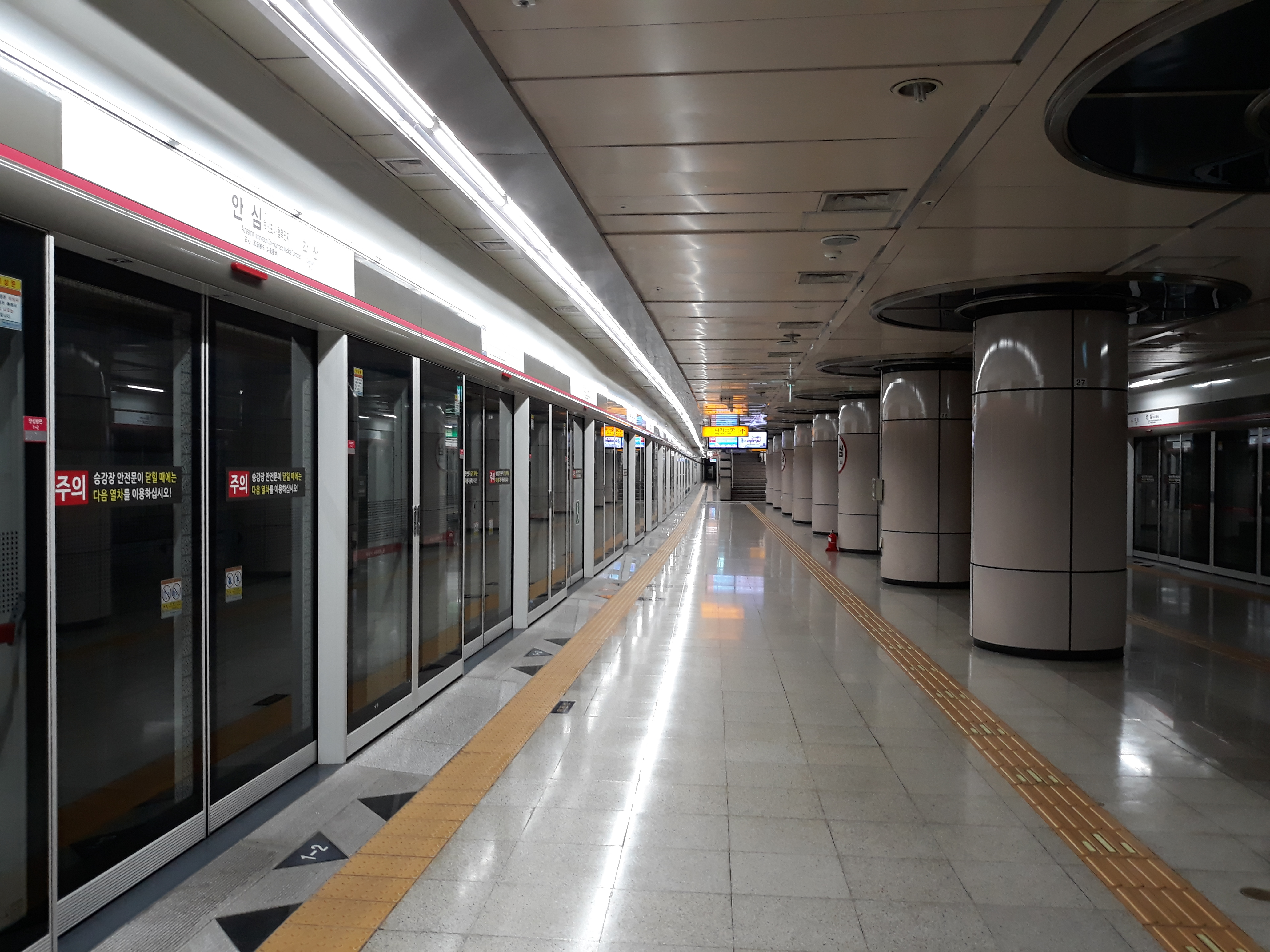 대구 도시철도 1호선 안심역 당역 종착 승강장